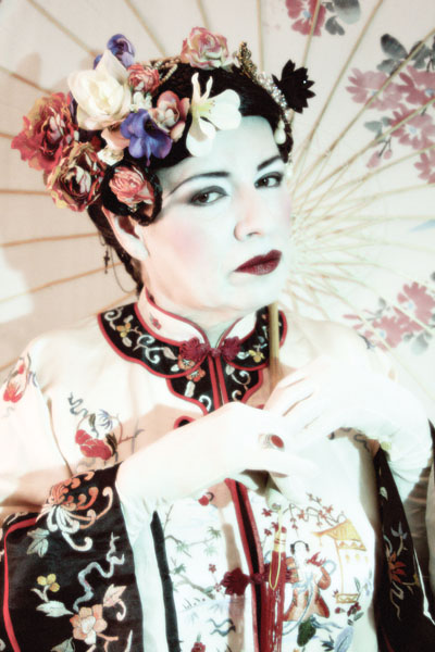 Eliška Bartek. Ta Číňanka jsem ja. jmenuje se to "BAILIEN" to znamena ta hezka, hodna. Žila jsem rok v cine kde jsem i pracovala a ti cinane men tak nazvali. potom byla vystava v berline, a kazdy mnel udelat fotku jak se citi. a jelikoz jsem prave po roce prijela z te ciny citila jsem se jako cinanka. a tak jsem se i tak nechala vyfotit.